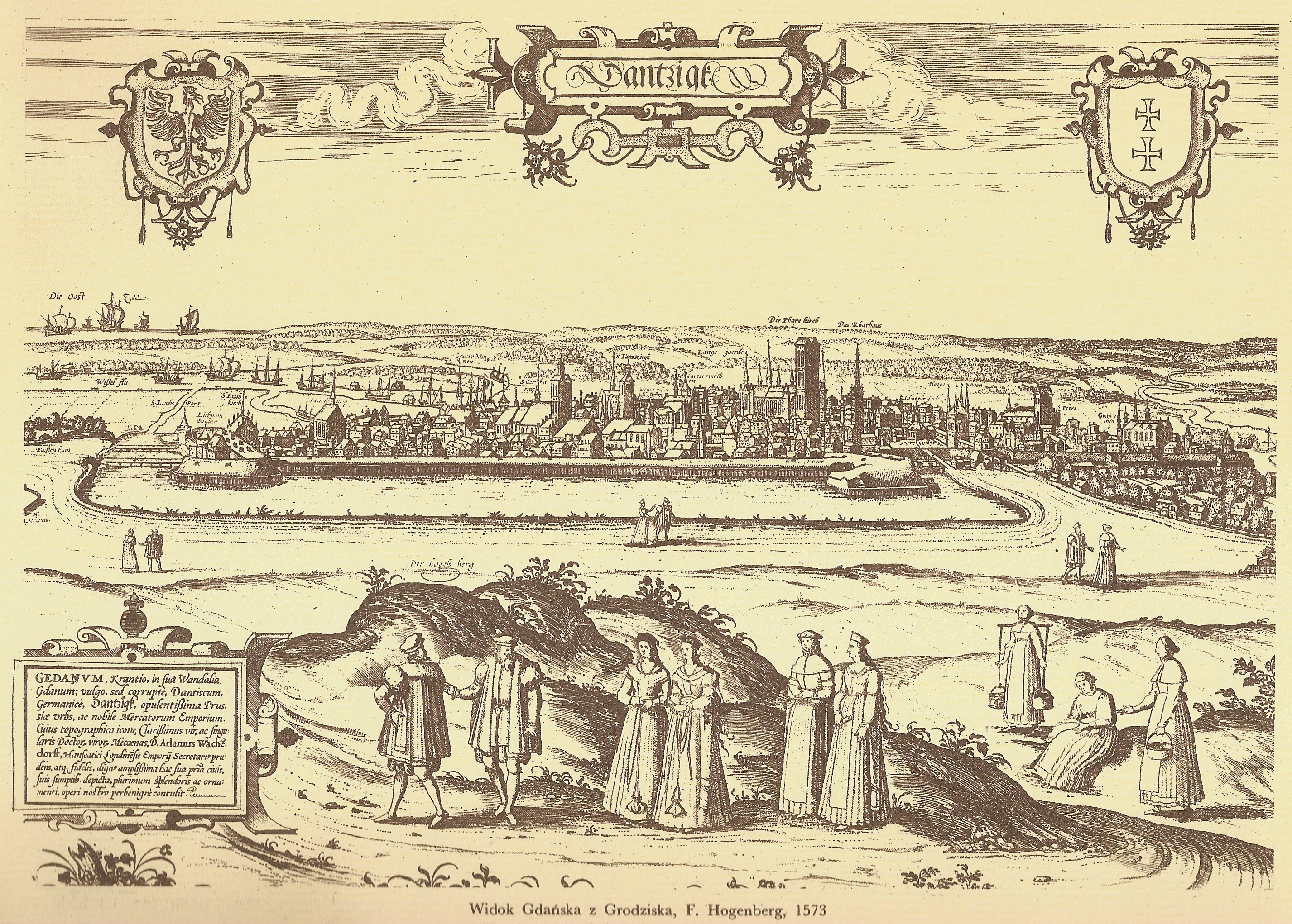 Grafika Panorama Gdańska miedzioryk z 1573 F. Hagenberg.